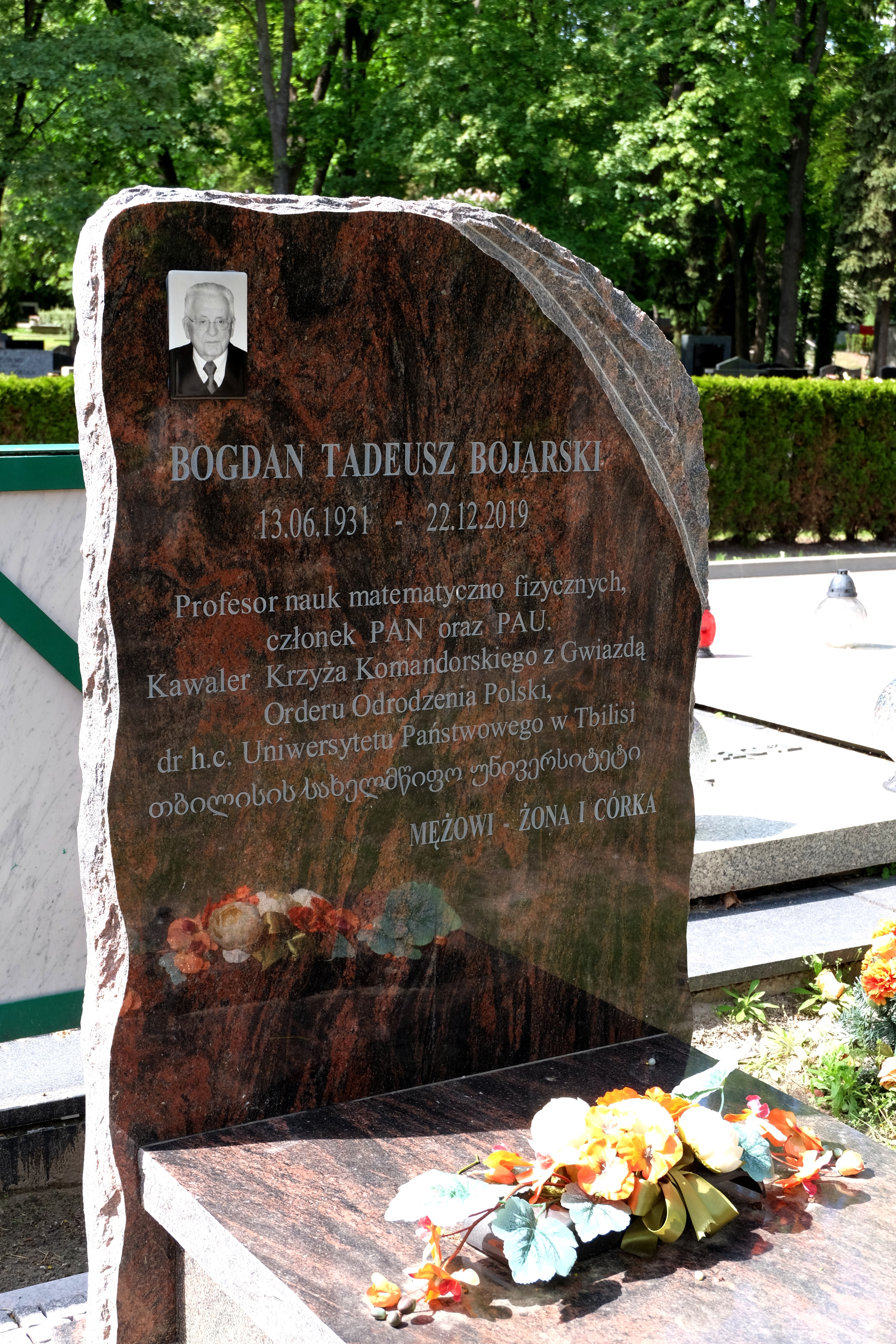 Grób matematyka Bogdana Bojarskiego na Cmentarzu Wojskowym na Powązkach w Warszawie